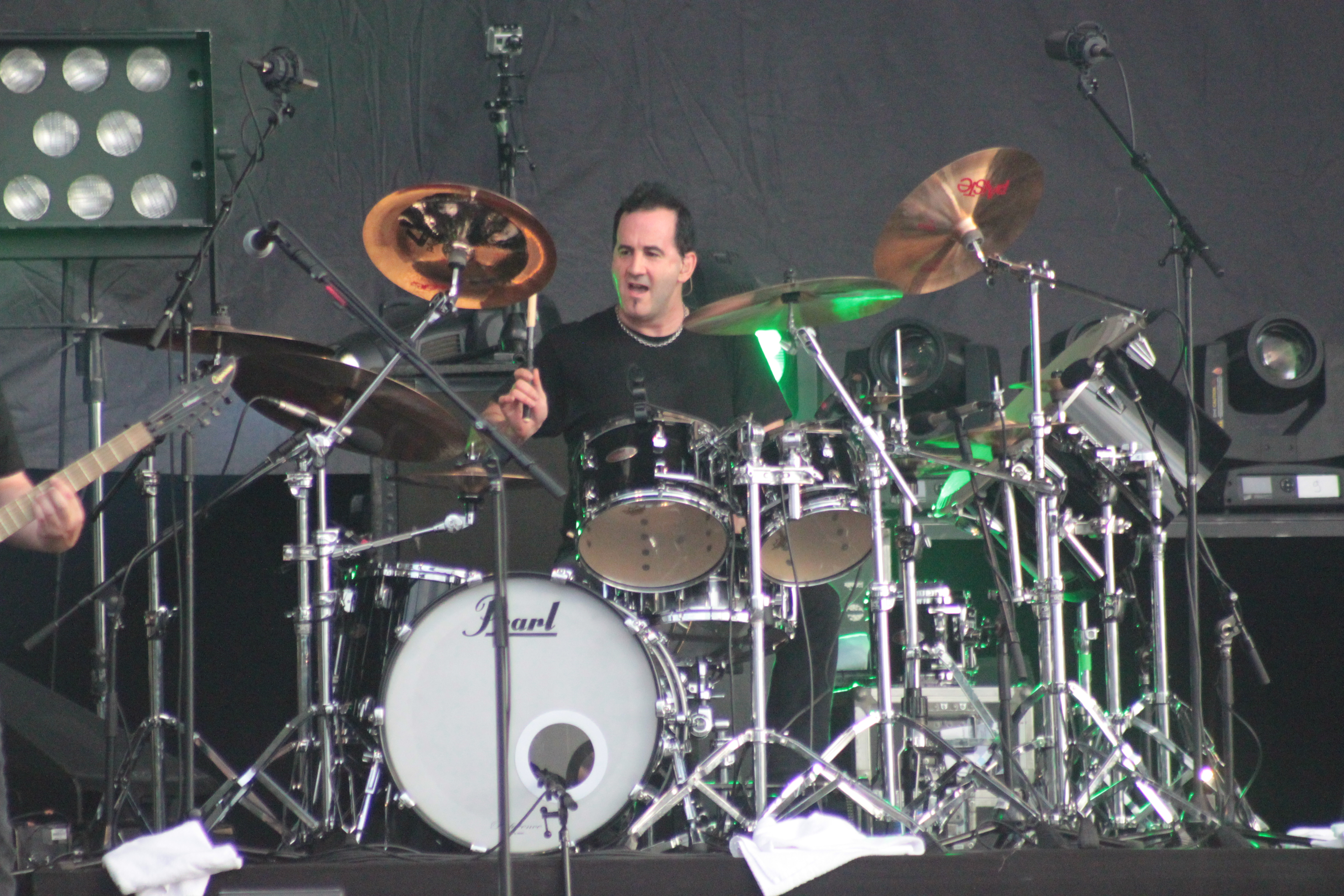 John Macaluso, Symphony X, Hellfest 2013, Fr-44-Clisson.